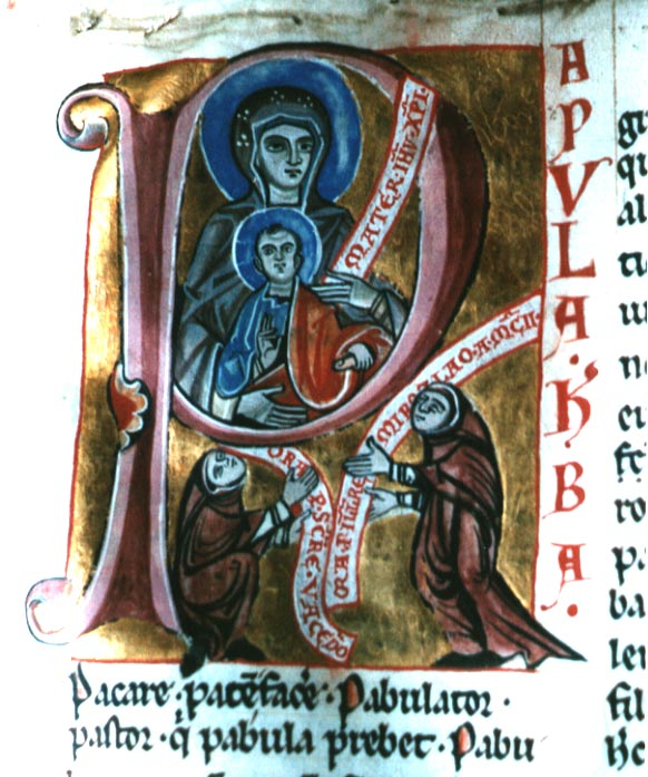 Mater verborum, iniciála P na fol. 230r s Pannou Marií a dvěma mnichy jako prosebníky. V nápisových páskách u mnichů se nachází údajné určení autorů (a datace): Vlevo písař Vacerad, vpravo ilimuninátor Miroslav a datum MCII = 1102 (resp. MC[C]II = 1202). Nápisy jsou ale dnes považovány za podezřelé (falšované), dílo je tedy považováno za anonymní a datuje se do první poloviny 13. století (okolo 1240).